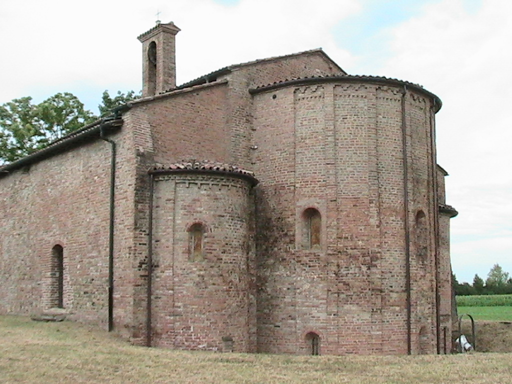 San Secondo Parmense - Pieve di San Genesio - Sec. XI - XIII